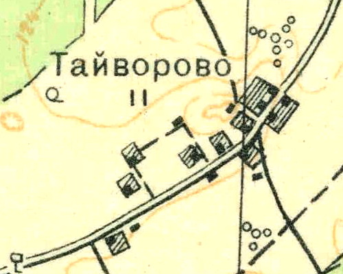 Топографическая карта Ленинградской области, квадрат О-35-24-Б-в (Вохоново), деревня Тойворово